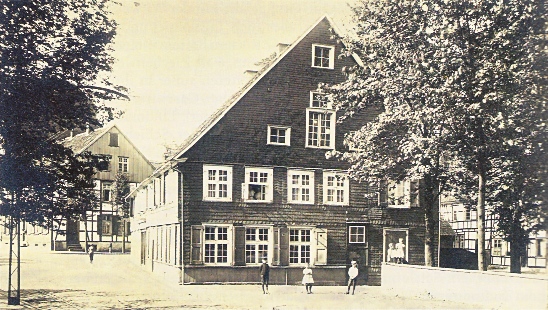 "Rentrops Hof" in Möllenkotten, Blick auf die Nordfassade. (Der Hof wurde Anfang der 1960er Jahre abgerissen.)